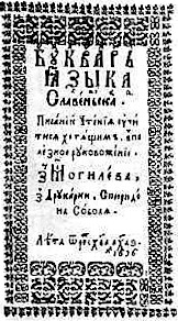 Страница из Букваря С.Соболя